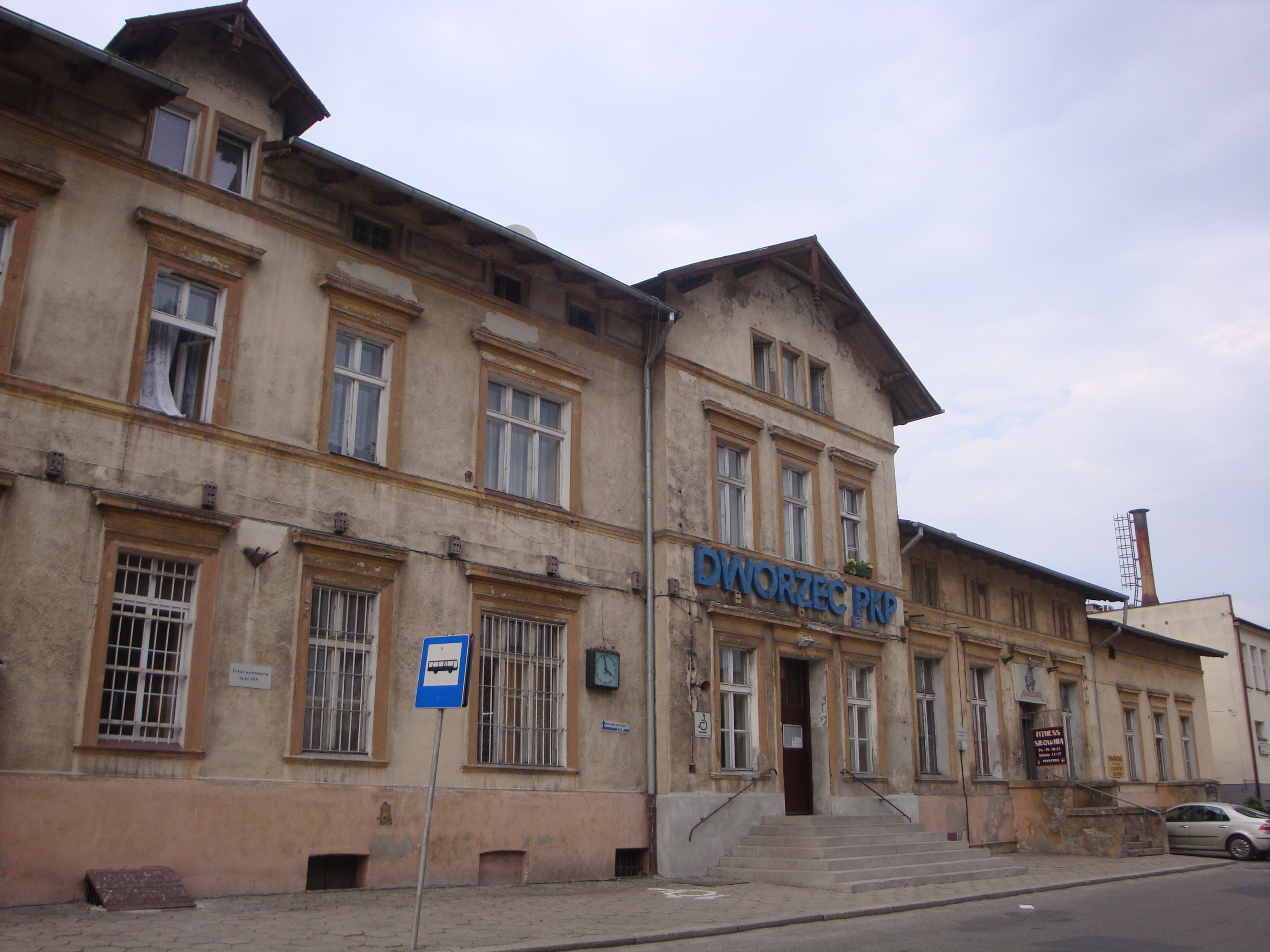 Dworzec kolejowy w Nakle nad Notecią. This photo was taken during Railway Wikiexpedition 2013 set up by Wikimedia Polska Association.You can see all photographs in category Wikiekspedycja kolejowa 2013. English | polski | +/−